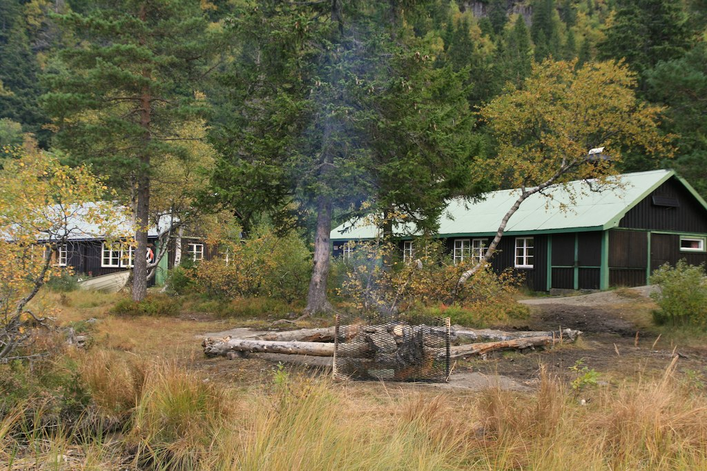 Ivarsbu i Skrimfjellene